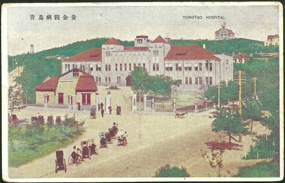 青岛病院正门门诊楼